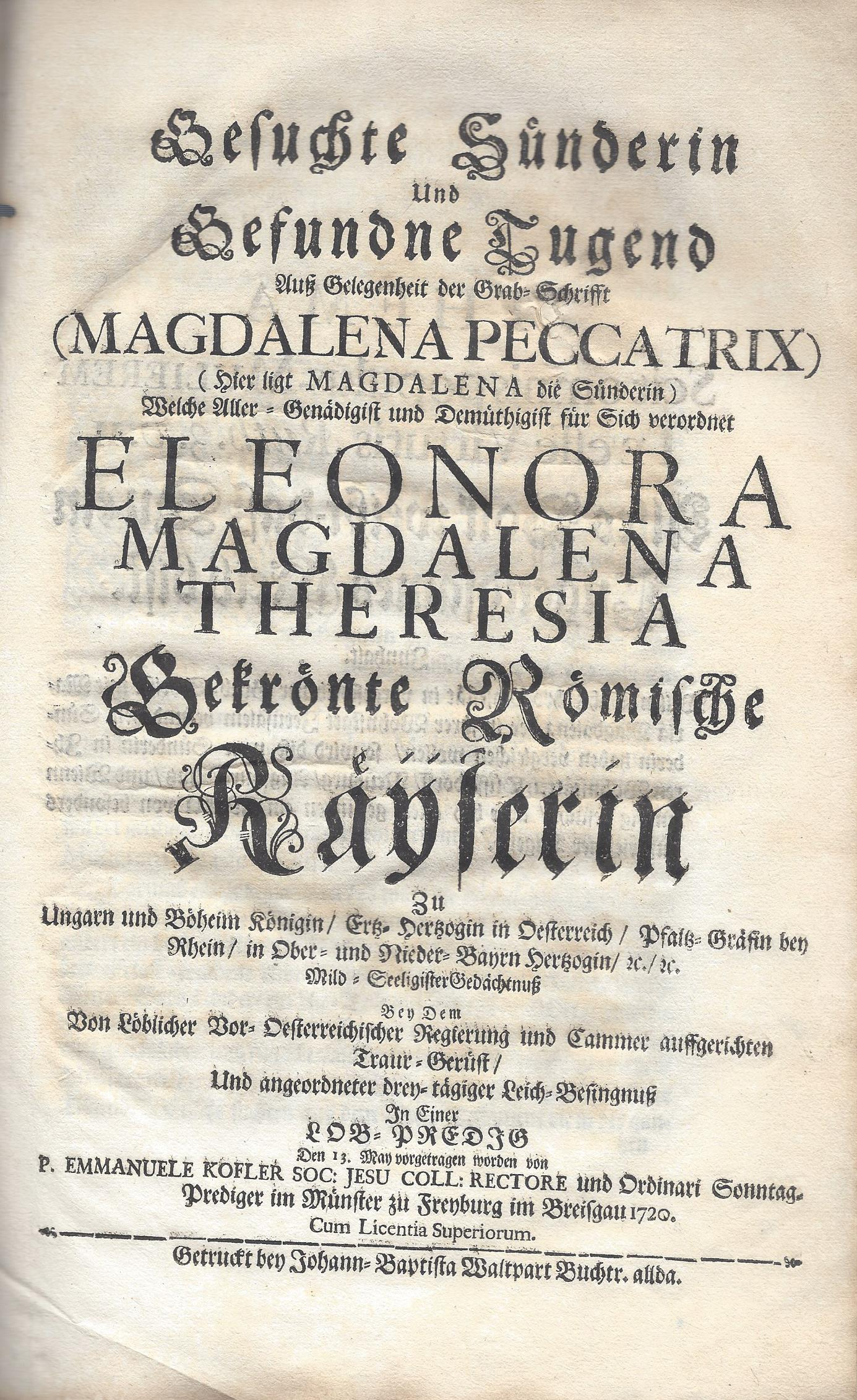 Titelblatt zu: Gesuchte Sünderin und gefundene Tugend auss Gelegenheit der Grab-Schrift (Maria Peccatrix), Freiburg im Breisgau, Johann Baptista Waltpart, 1720.